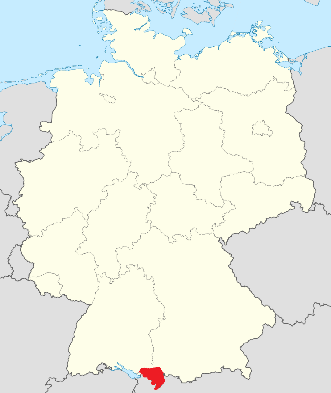 Karte: Allgäu (Skizze) / Map: Allgaeu (sketch)